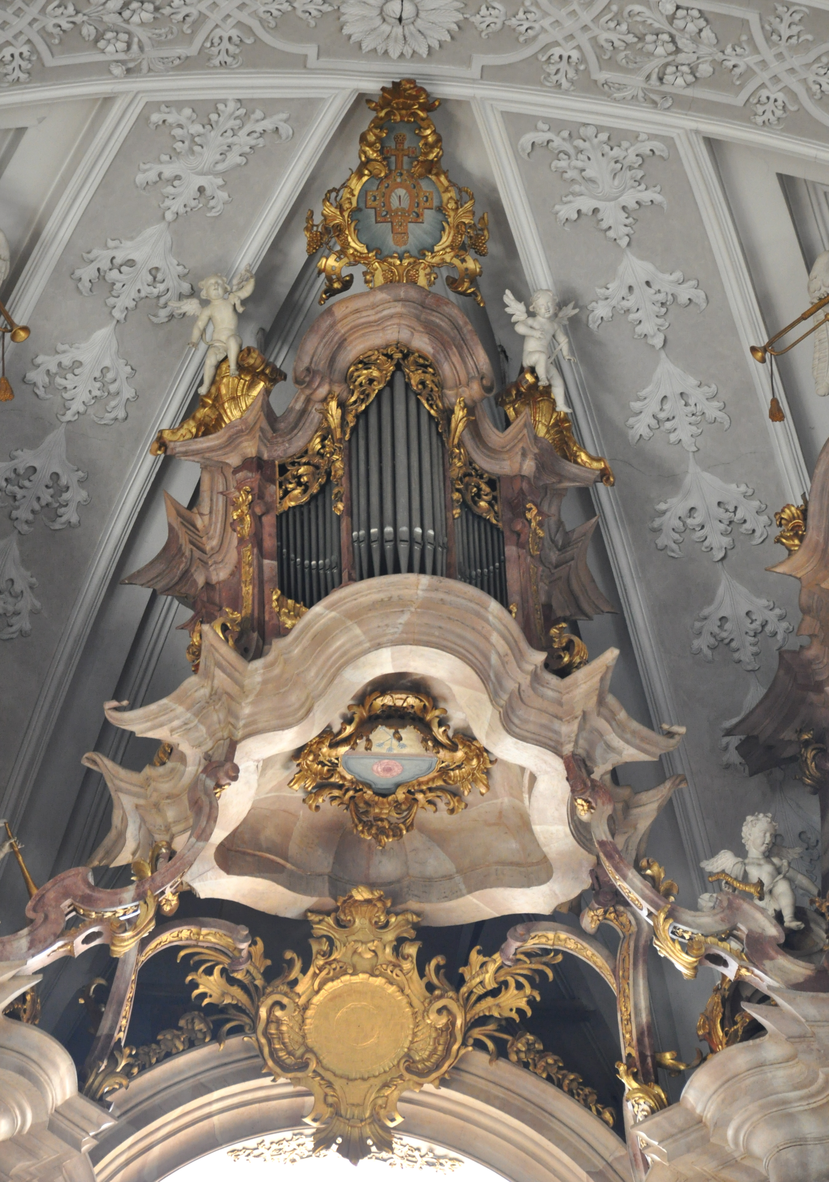 Hauptorgel der Basilika St. Martin und Oswald in Weingarten (Württemberg) von Joseph Gabler („Gabler-Orgel“) Kronpositiv